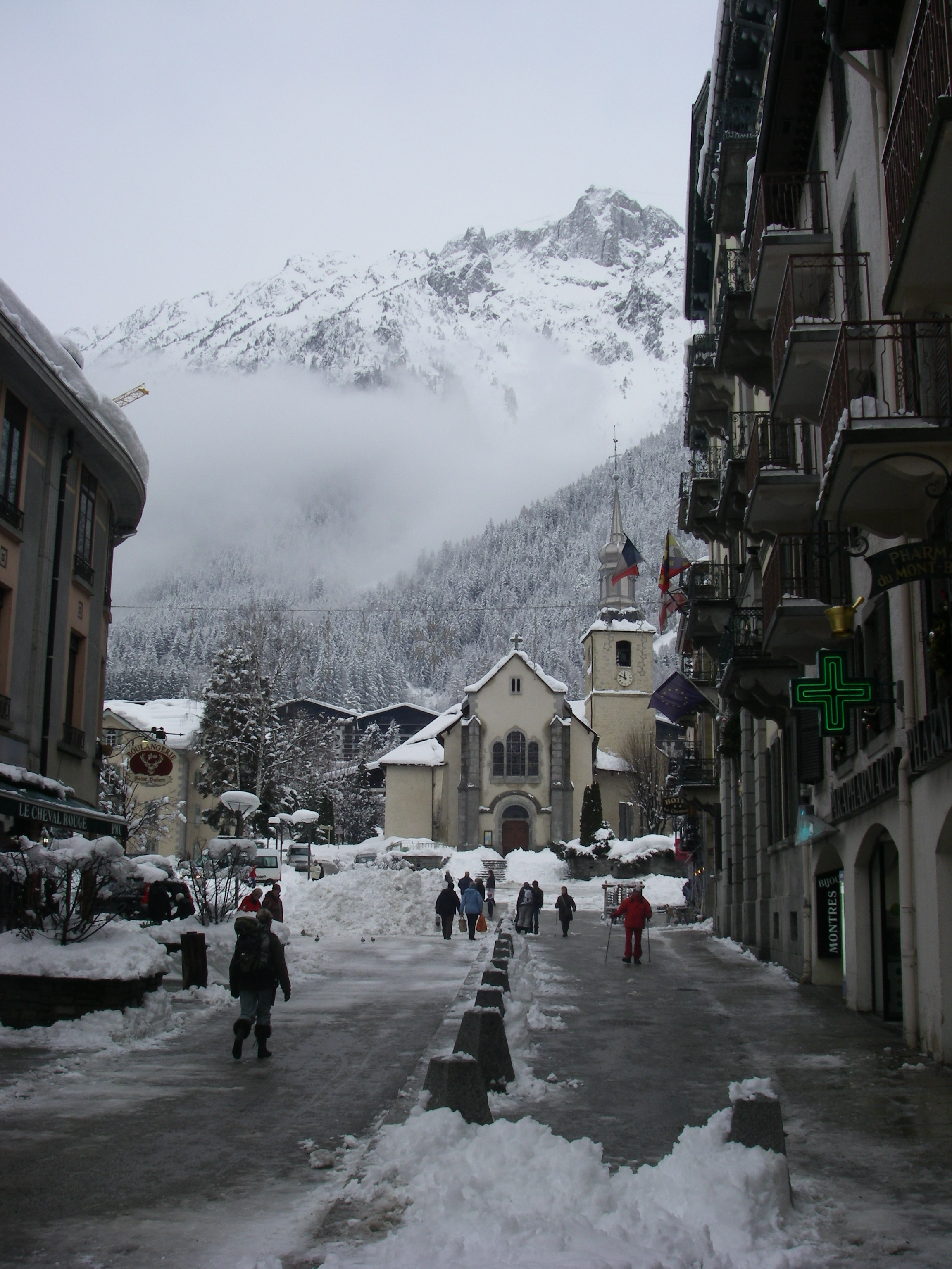 Chamonix im Winter 2012, Blick auf die Kirche